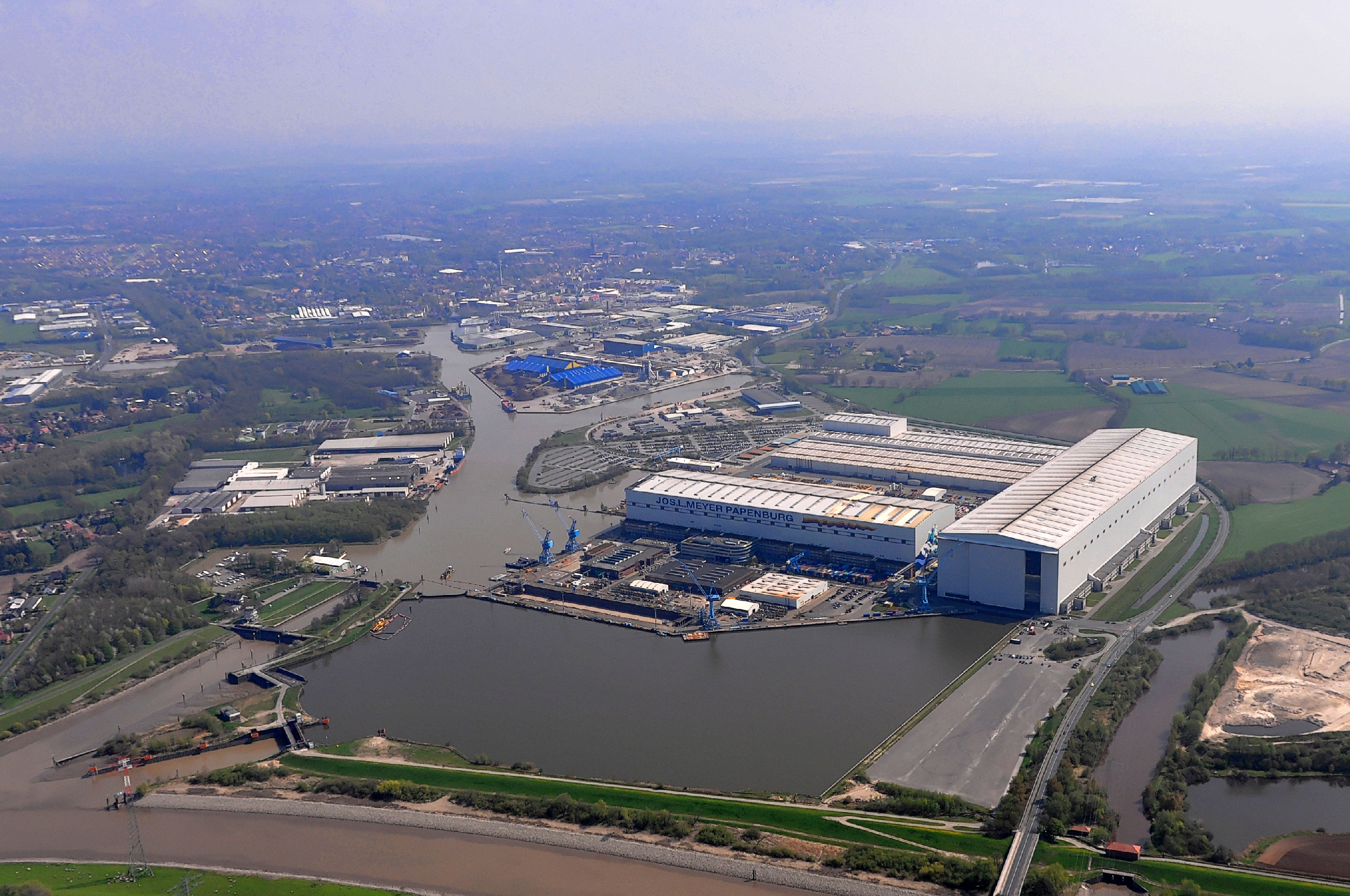 Luftbilder von der Nordseeküste 2013-05